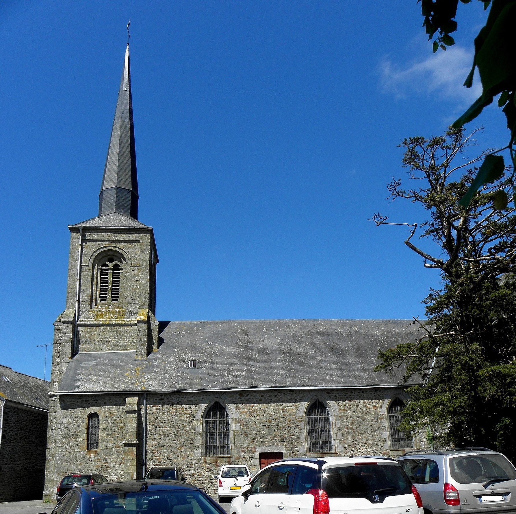 Église Saint-Aubin de Vautorte (53).